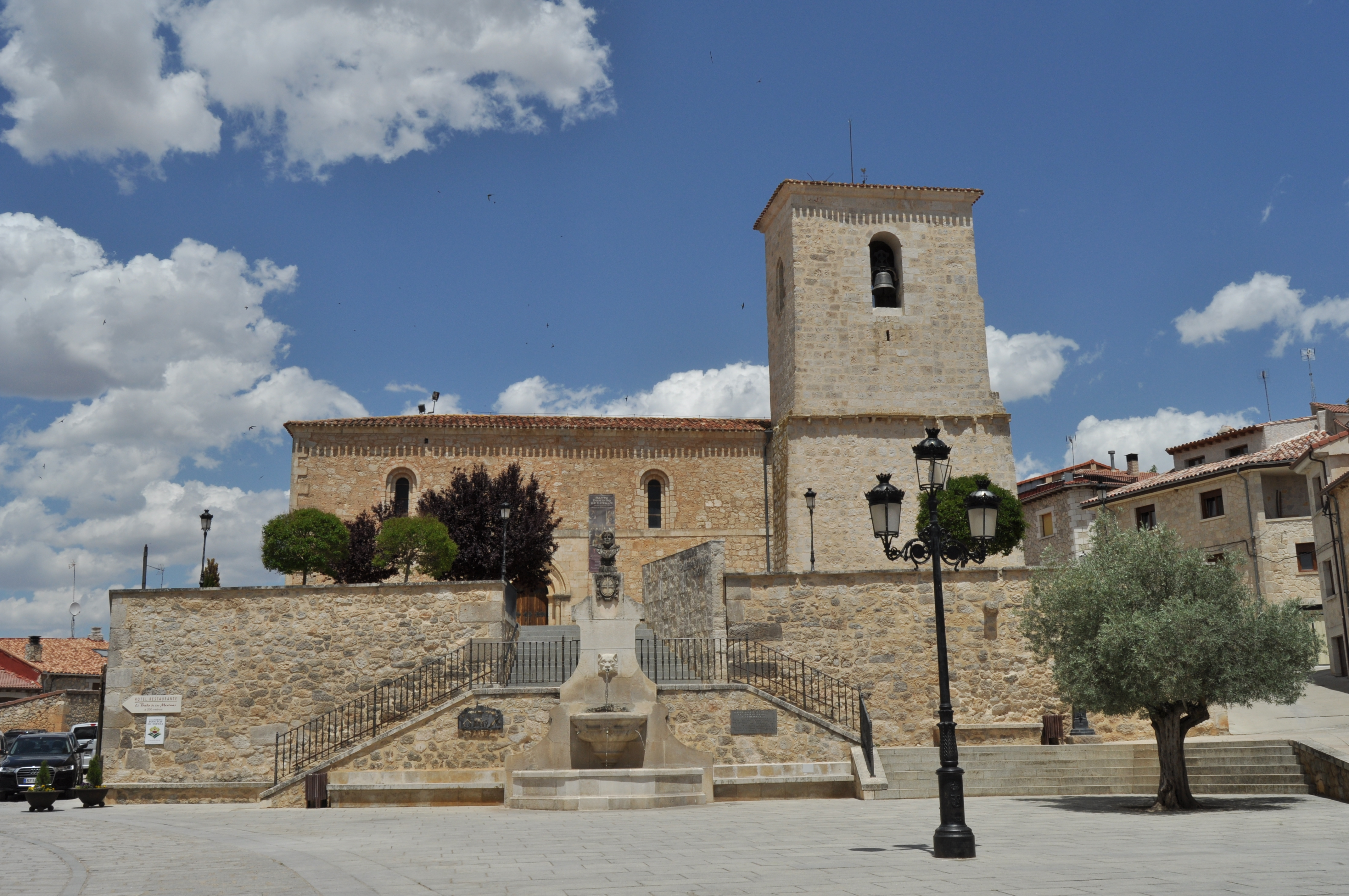 Caleruega - 007